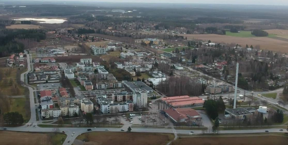 Jukola ilmasta.